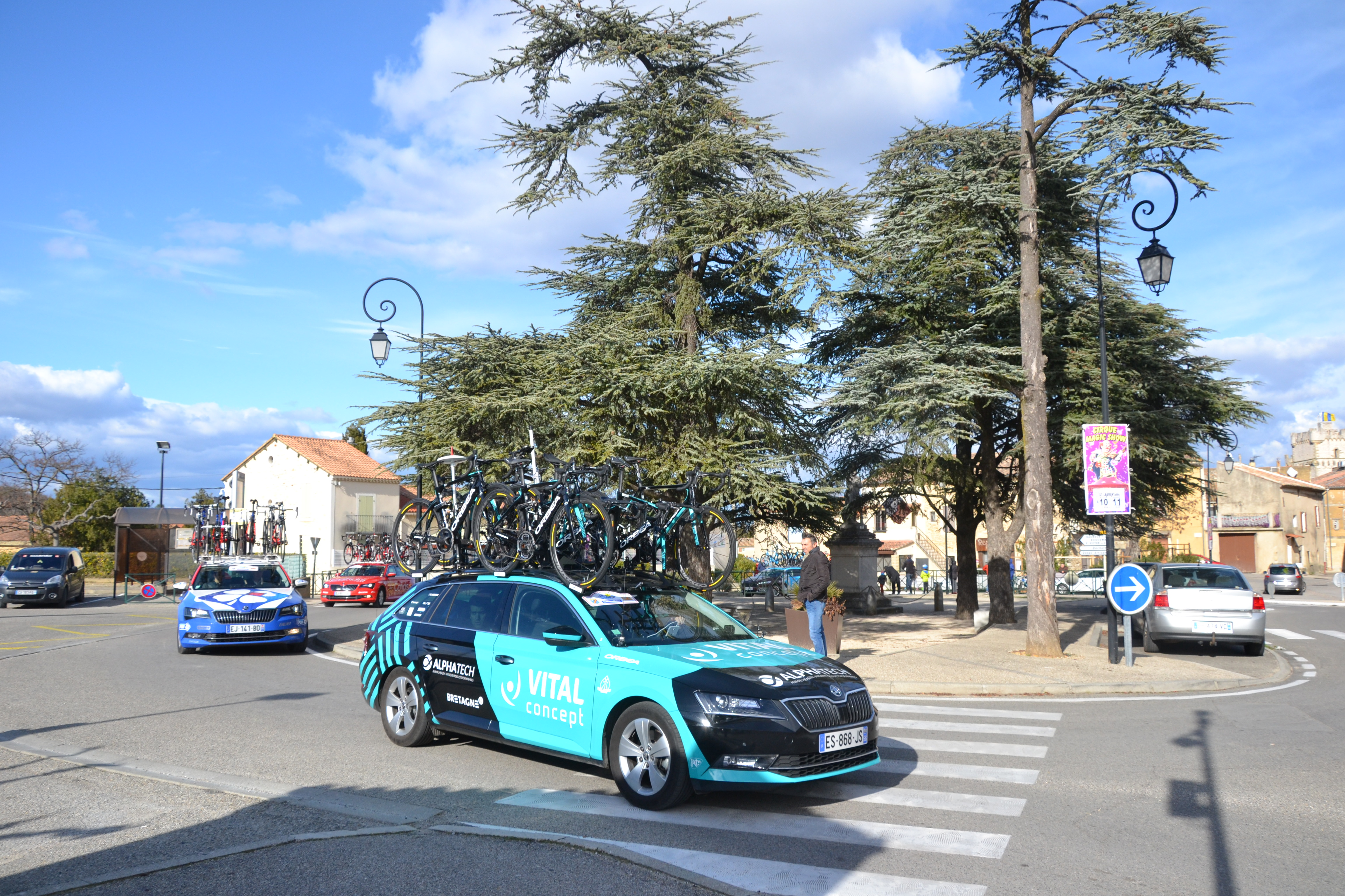 Lors de la 4ème étape de l'Étoile de Bessèges 2018